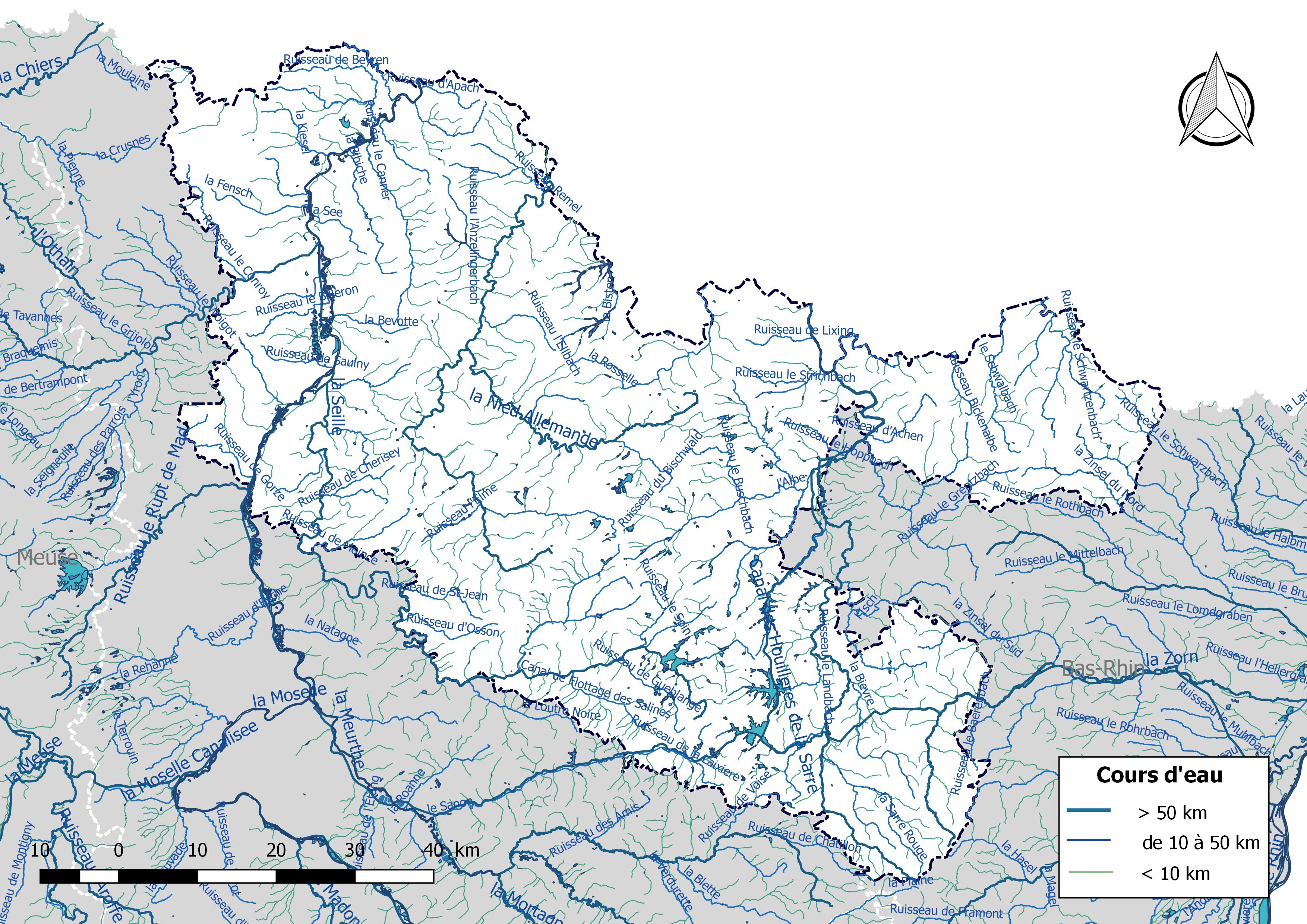 Réseau hydrographique du département de la Moselle (France).